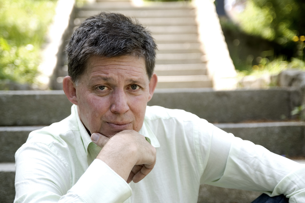 Tilman Jens (c) Thomas Liehr